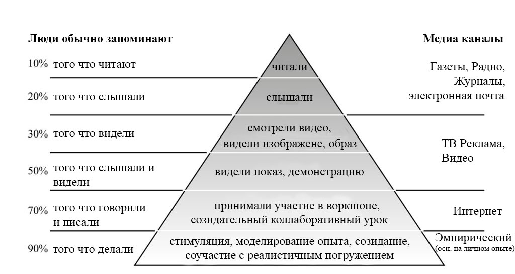 Эффективность каналов коммуникации для запоминания аудиторией информации